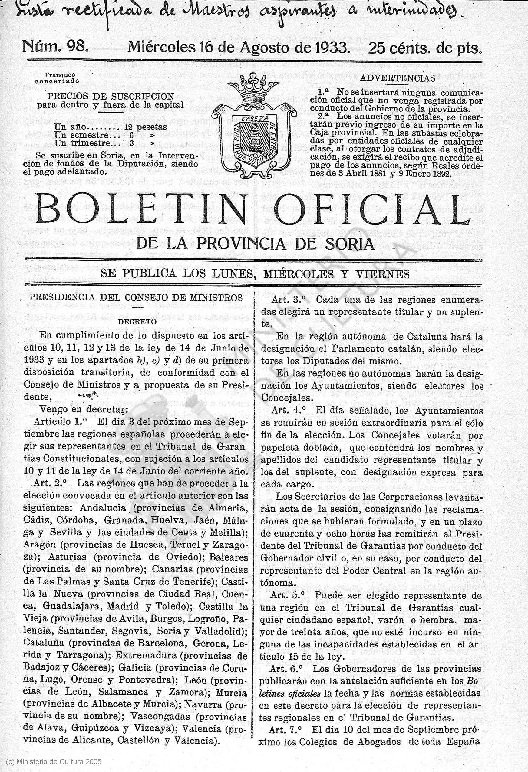 Página del Boletín Oficial de la Provincia de Soria de 16 de agosto de 1933 en que se describen las regiones que han de proceder a la elección de un vocal en el Tribunal de Garantías Constitucionales de la Segunda República Española